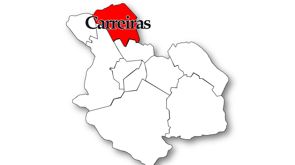 Evolução da População